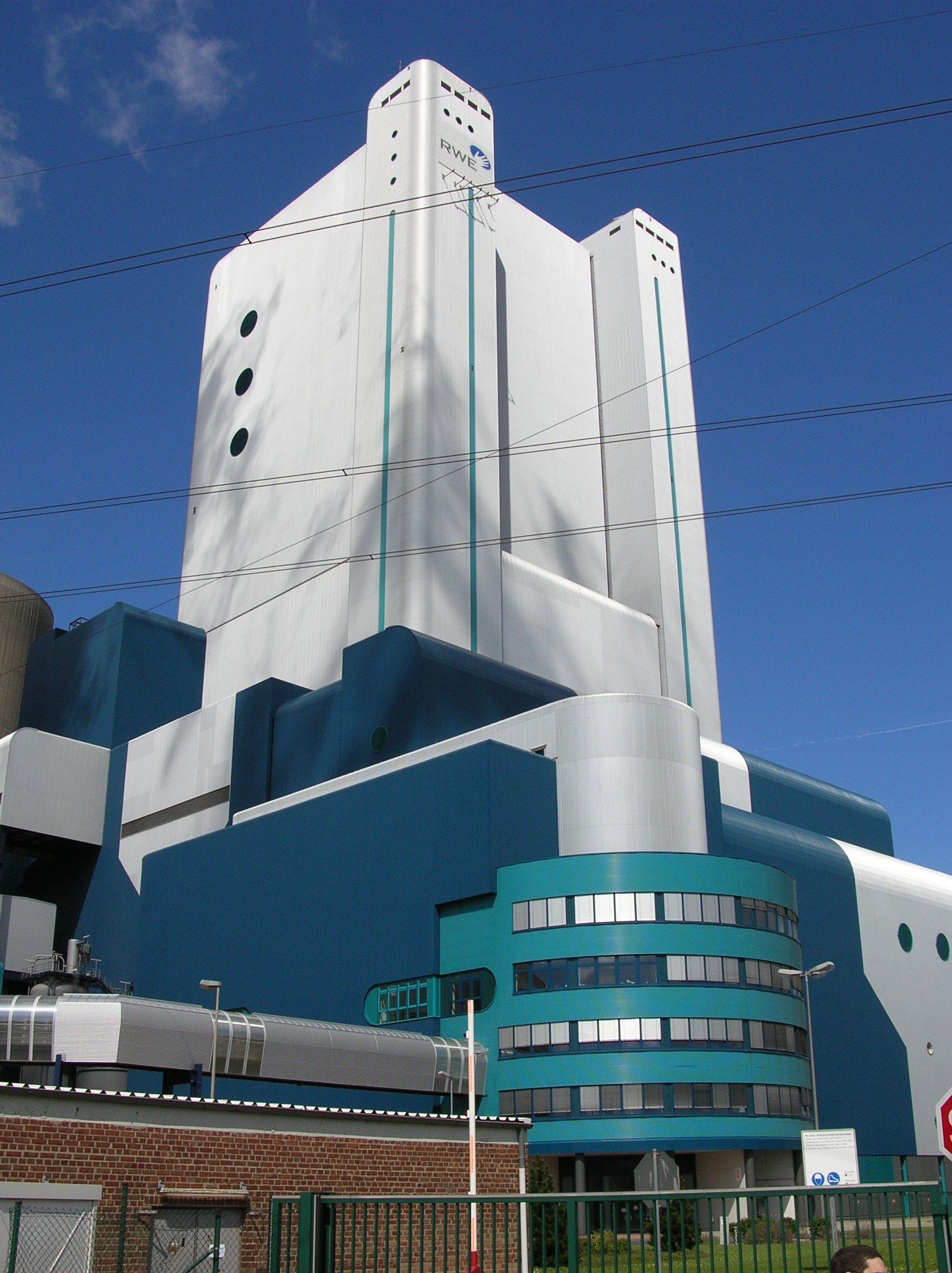 BoA-Kraftwerksblock in Niederaußem